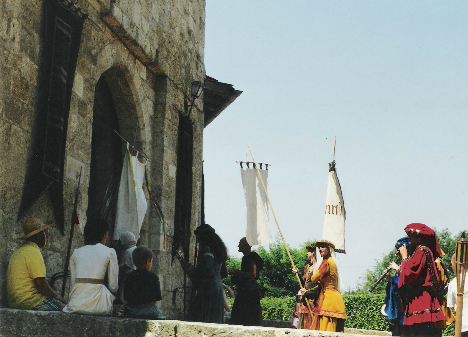 Défilé costumé entrant dans les remparts du village de Sarrant (France, Gers)